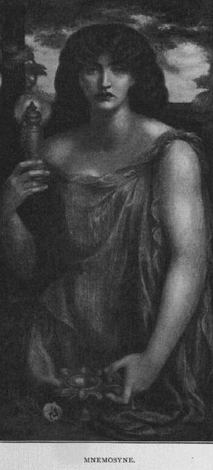 Mnemosyne, Greek godness